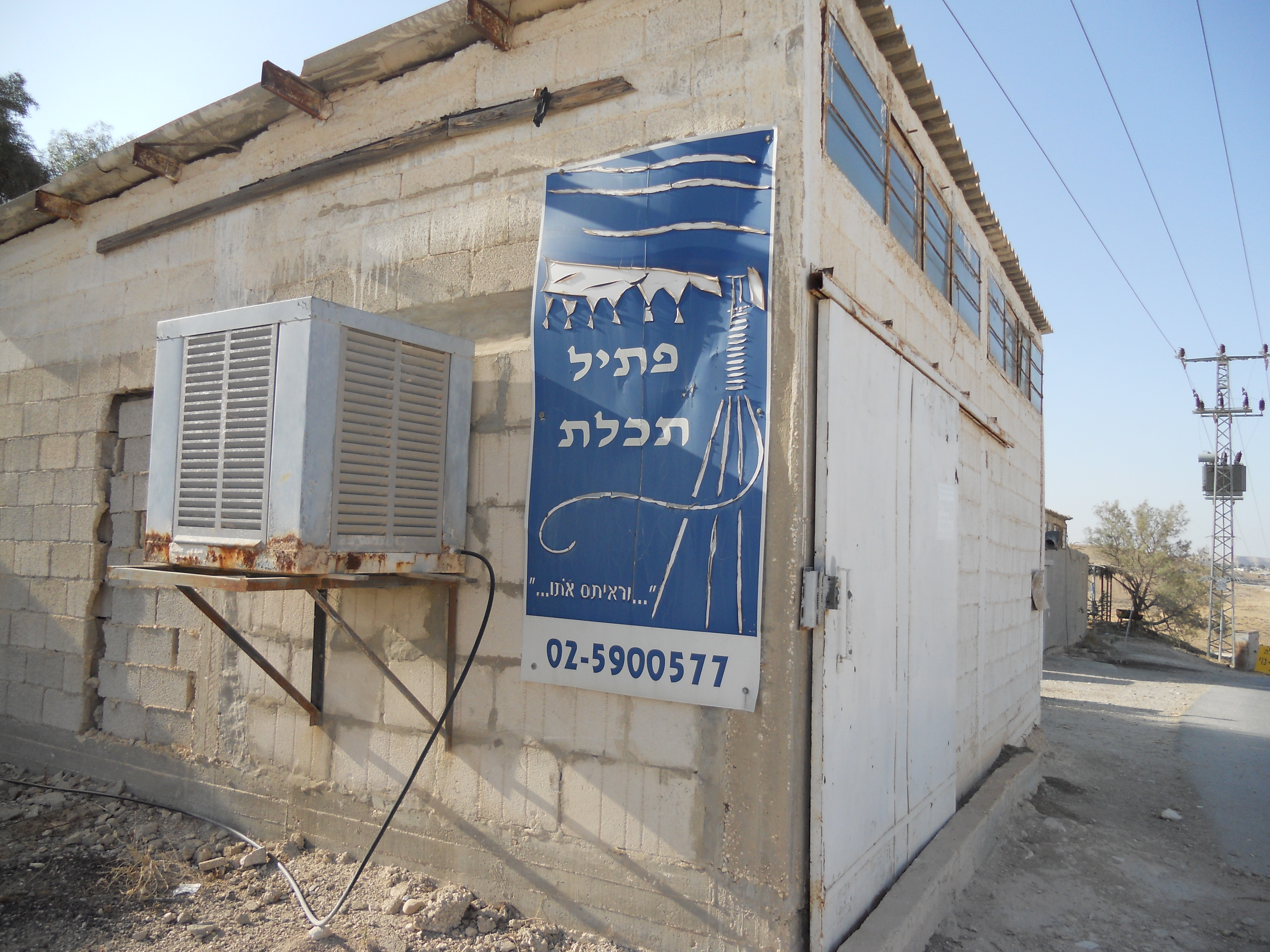 מפעל פתיל תכלת בכפר אדומים שנת תשע"א